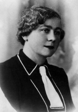 Marga Boodts, supuesta gran duquesa Olga